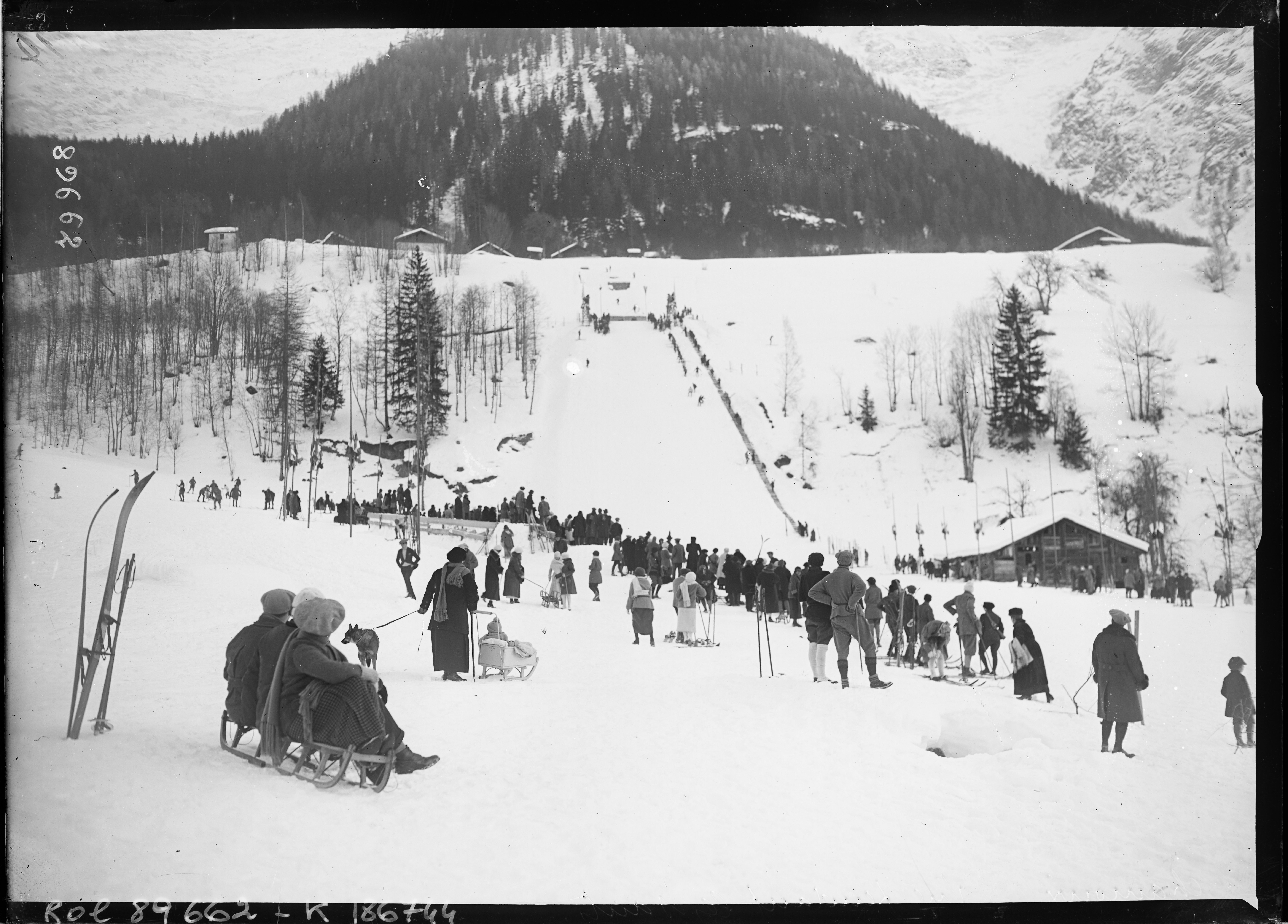 [Jeux olympiques d'hiver de] Chamonix, vue pendant les sauts [de l'épreuve du combiné nordique, 2 février 1924] : [photographie de presse] / [Agence Rol]